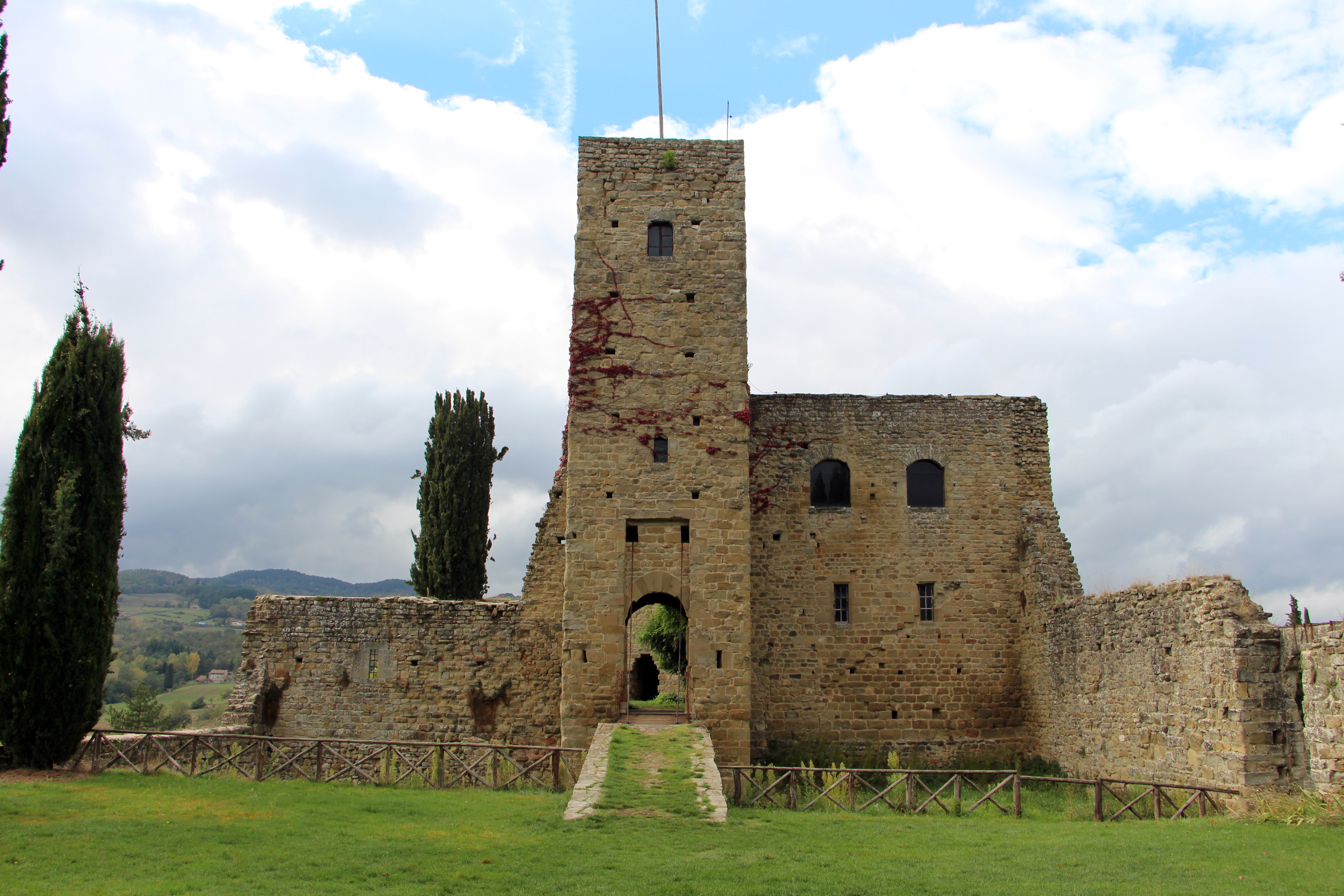 Castello di Romena